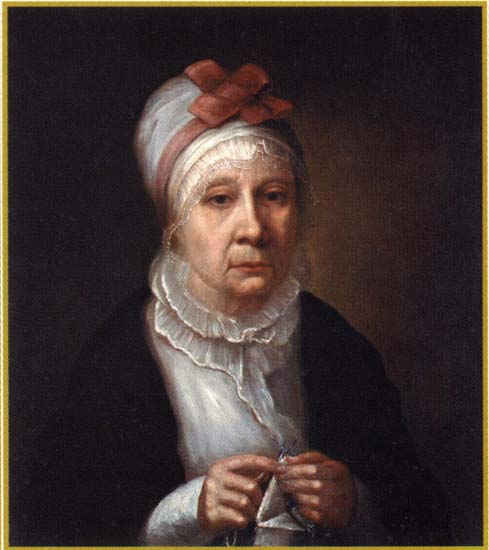 Екатерина Алексеевна Мусина-Пушкина? Рыбинский государственный историко-архитектурный и художественный музей-заповедник